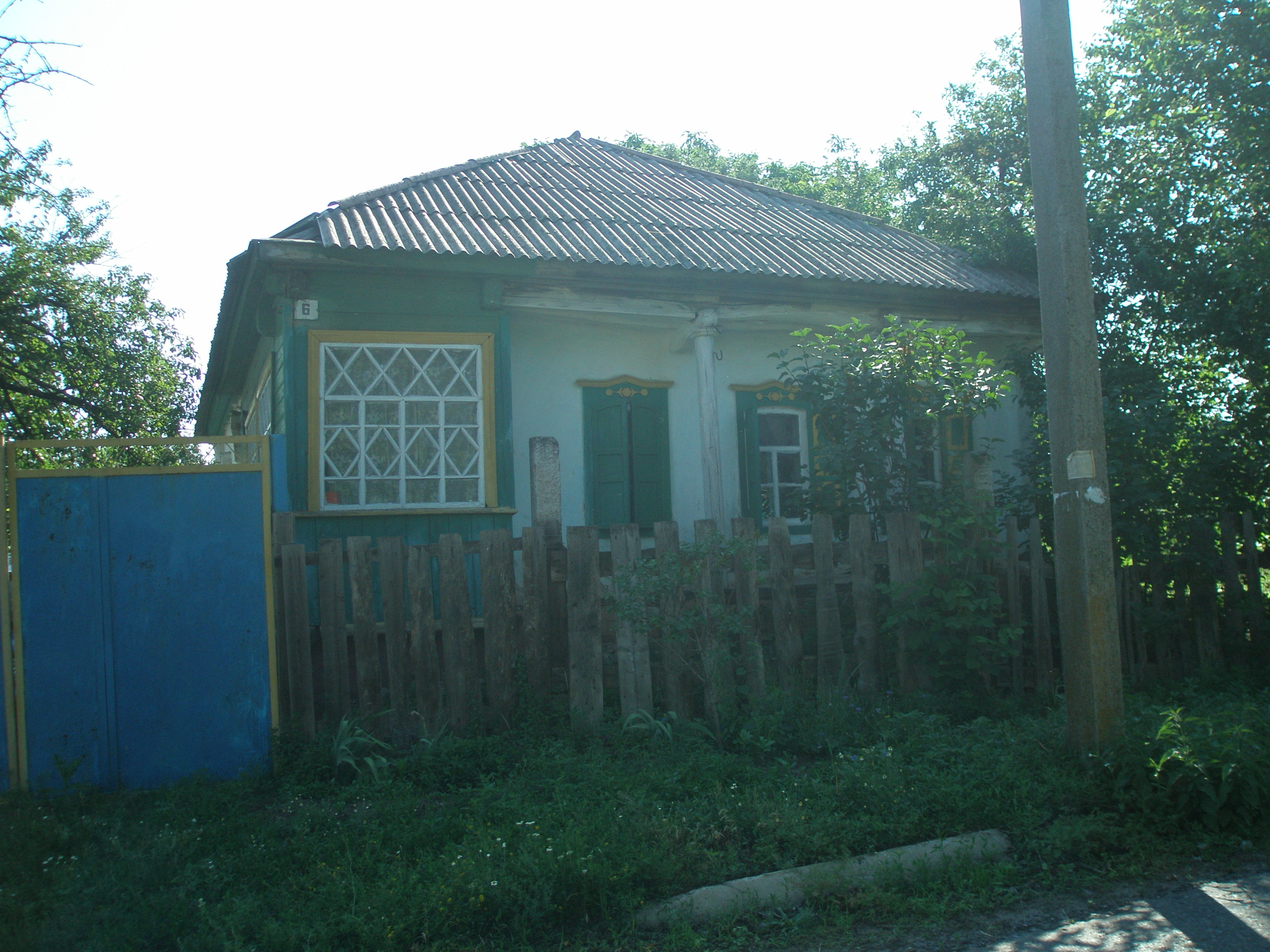 Хата в селищі Гречишкіне, Новоайдарського району, Луганської області, Україна